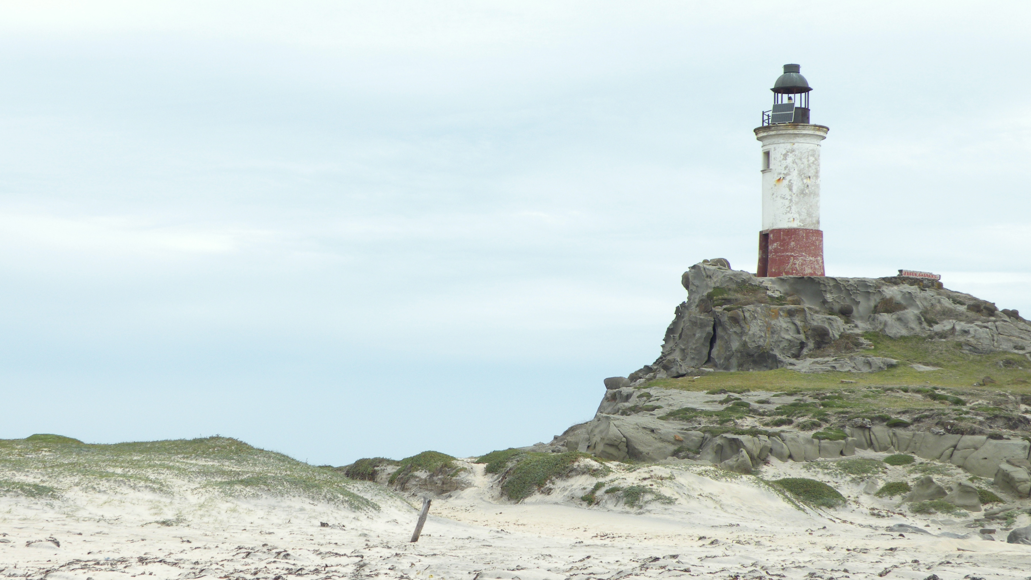 Lighthouse Isla Mocha